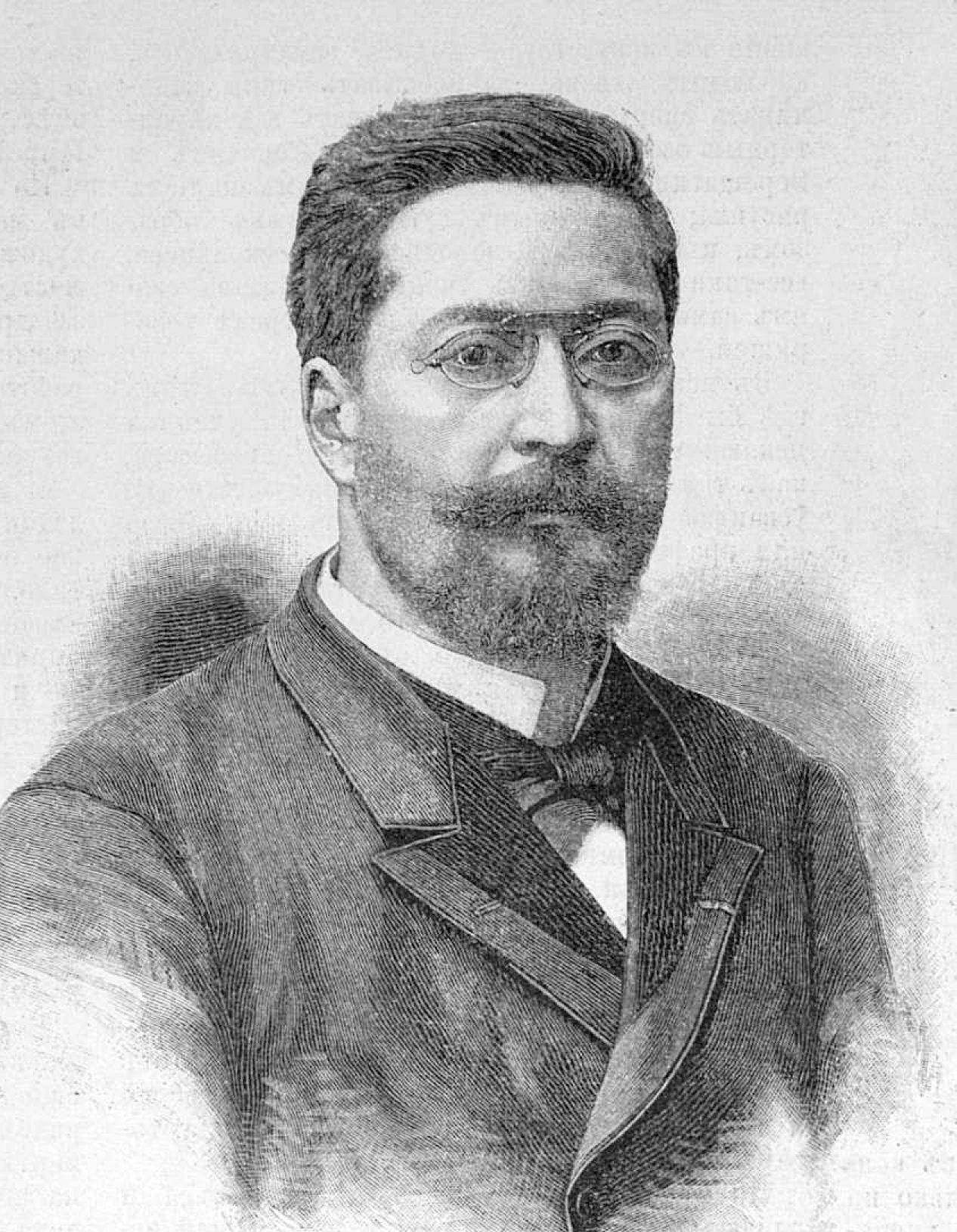 Auguste Burdeau, philosophe et homme politique